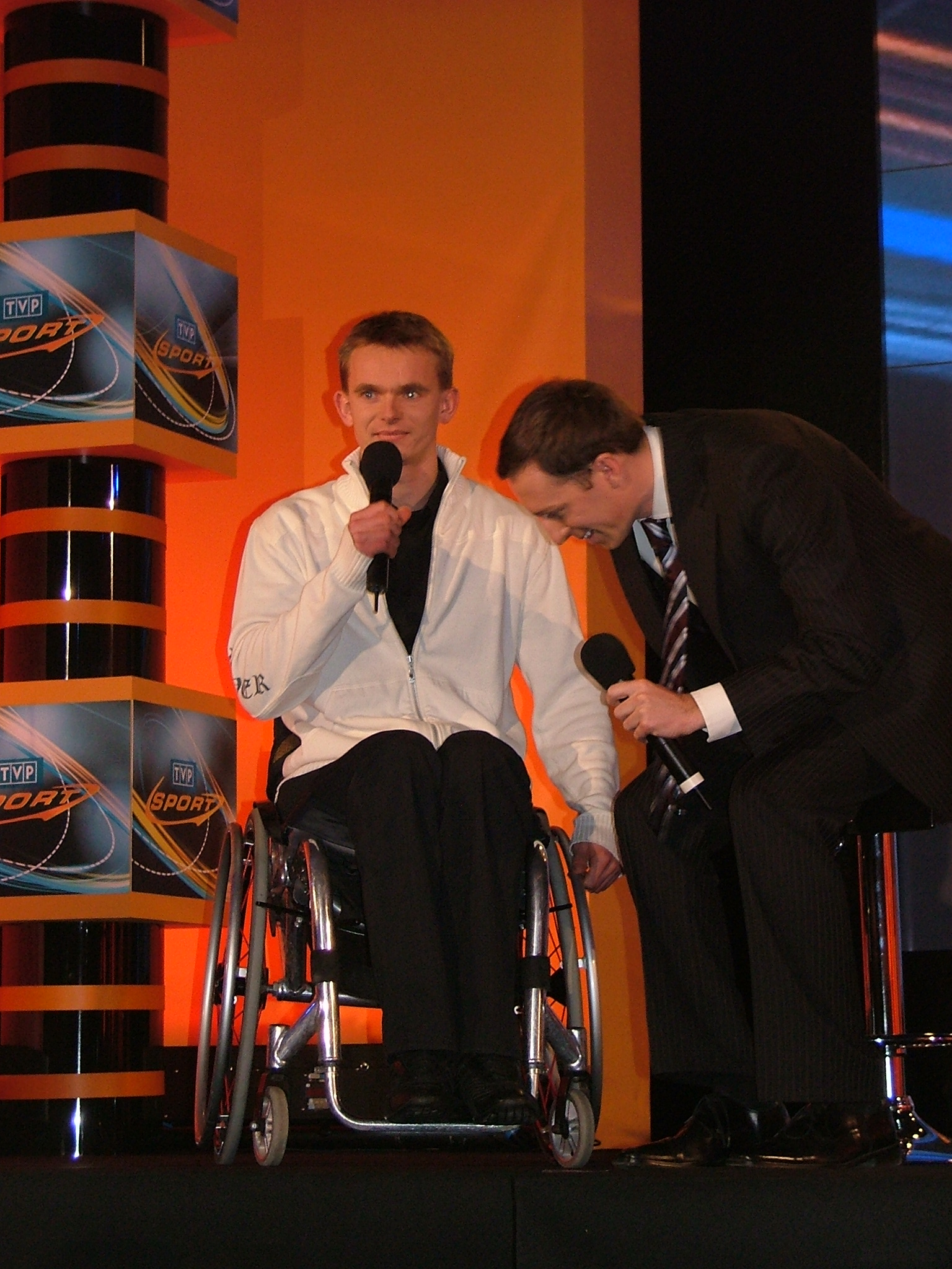 Impreza z okazji 1. urodzin TVP Sport, Warszawa, Centrum. Krzysztof Cegielski